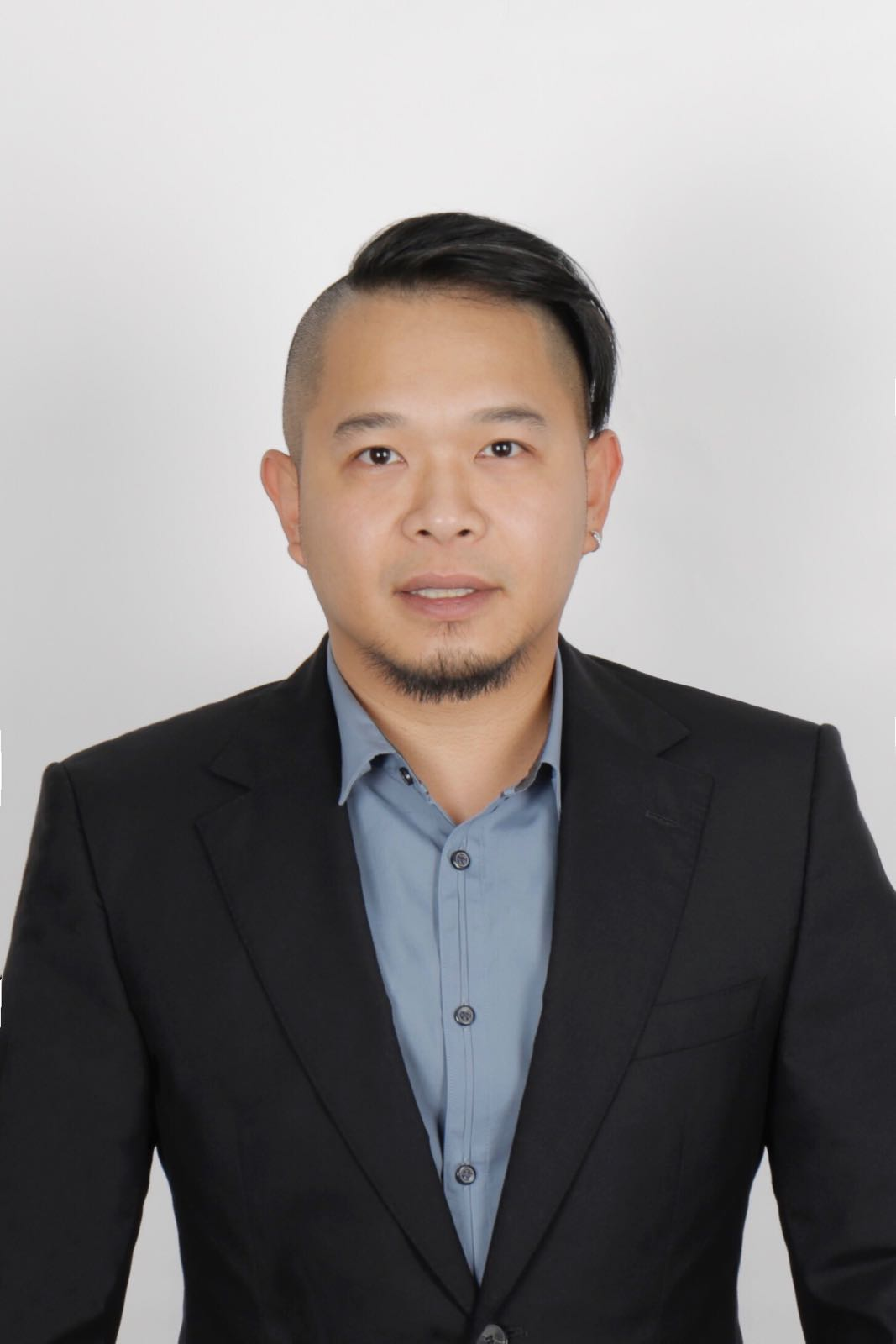 中文（香港）: 拍於影樓